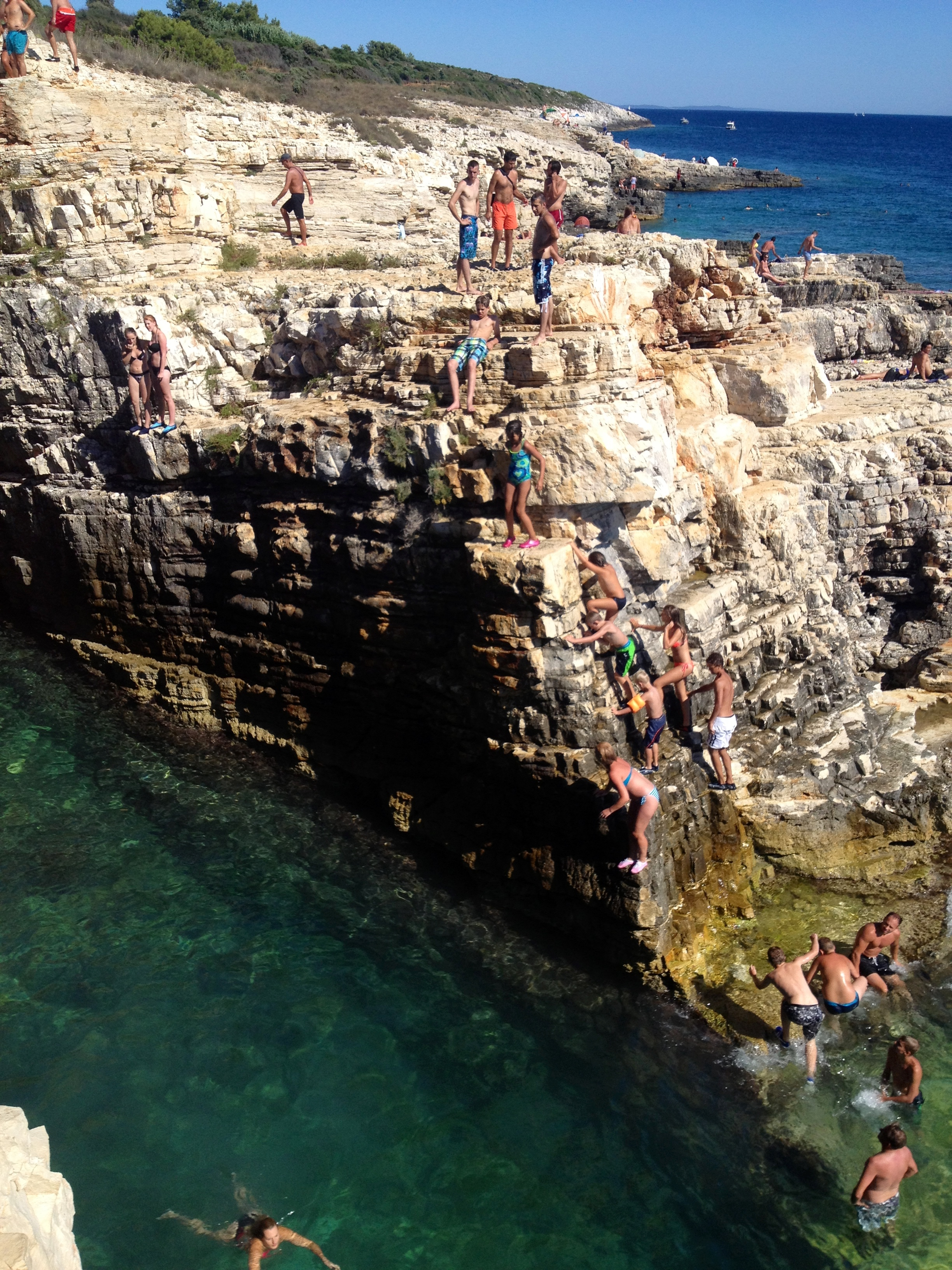 Rt Kamenjak rudisti vapnenac